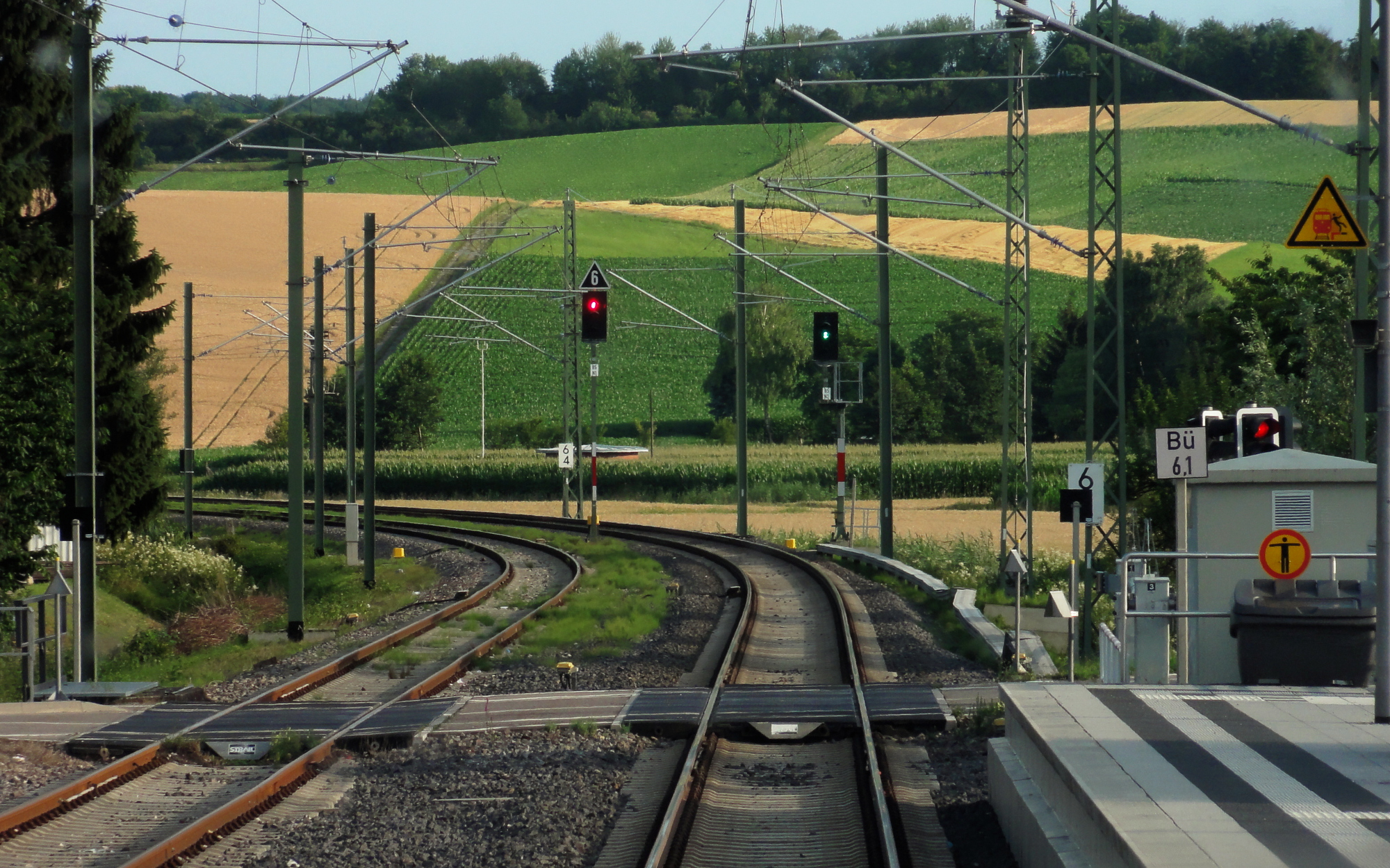 Ausfahrsignale des Bf Hoffenheim vom Bahnsteigbereich aus.